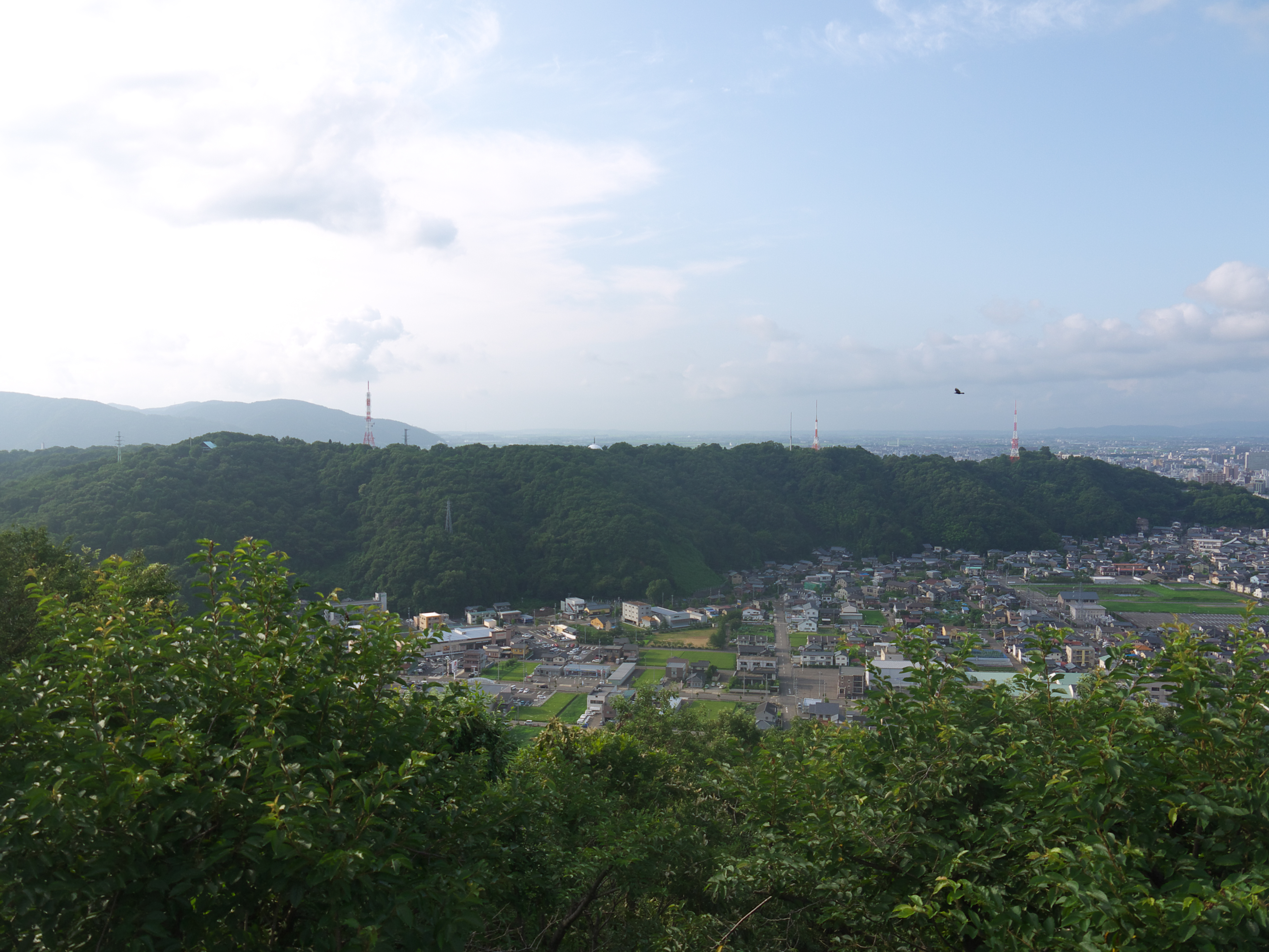 八幡山から見た足羽山